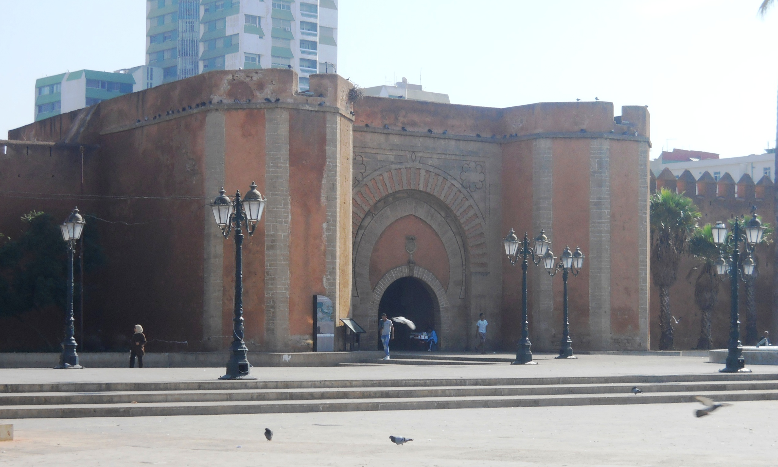 Bab El hadd, Rabat, Maroc